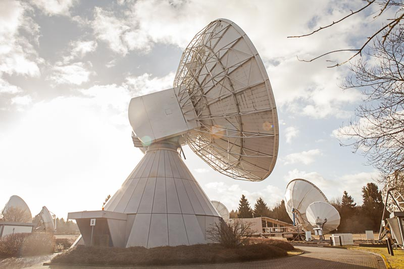 Erdfunkstelle Usingen, 19m Antenne